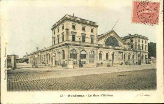 Gare d'Orléans à Bordeaux-Bastide